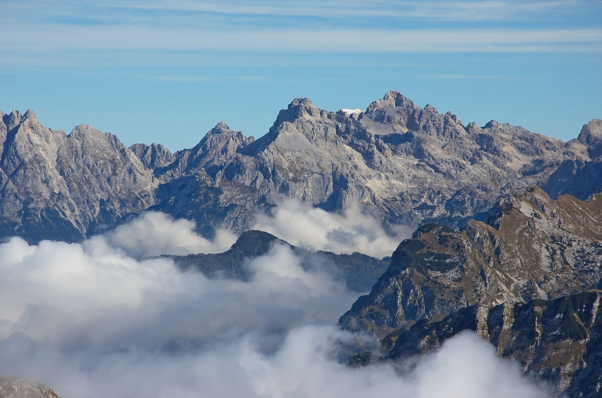 Razor (più vicino) e Škrlatica